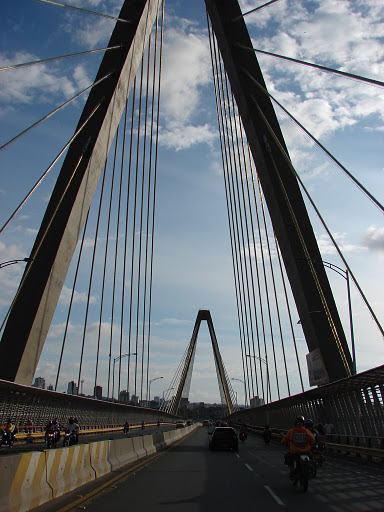 Pasando por el Viaducto de Pereira